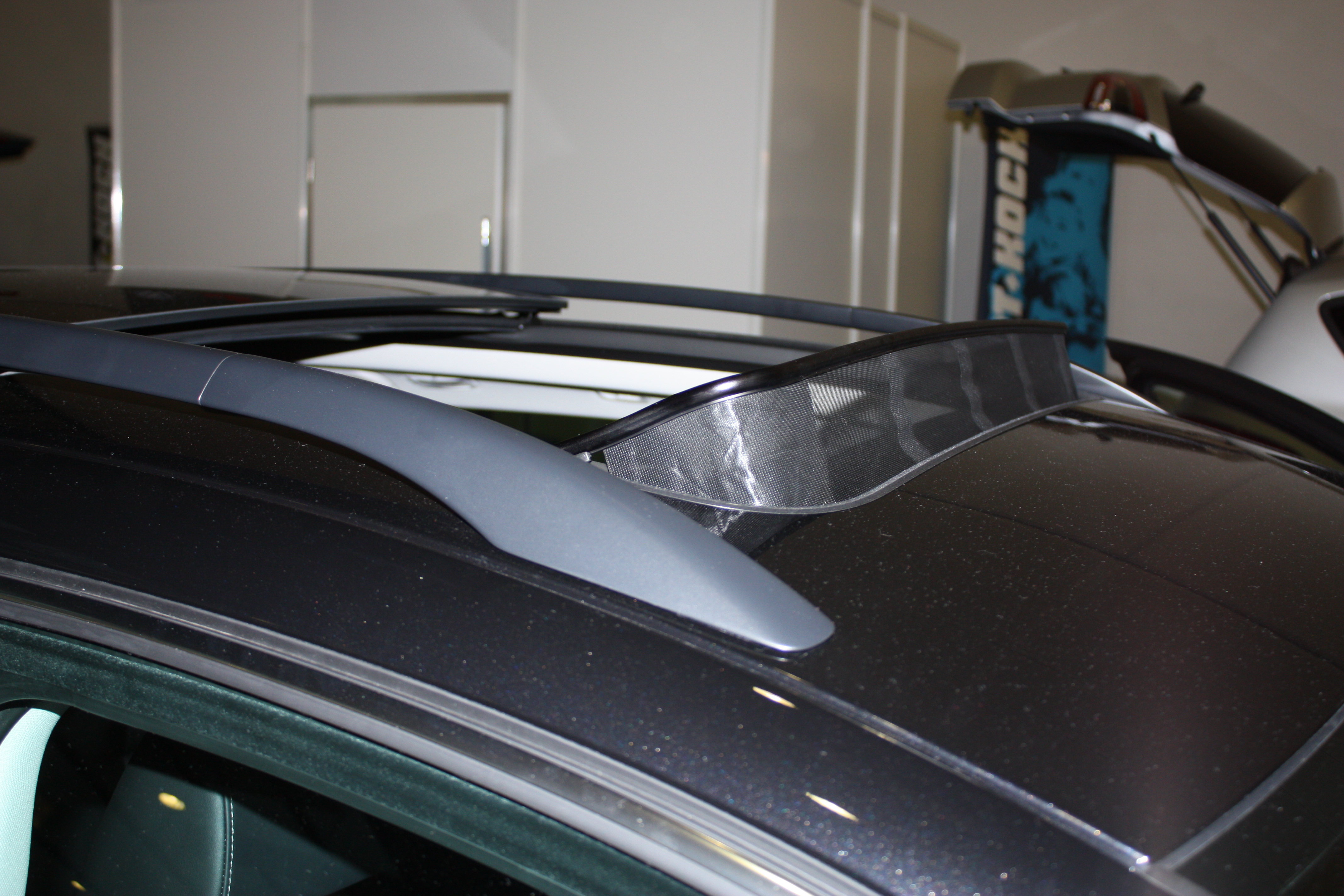 Schiebedach am Škoda Superb mit Windschutz, Windabweiser